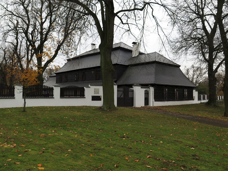 Lovecký zámeček Vlkov nad Lesy, čp. 1, jihovýchodně od kostela.